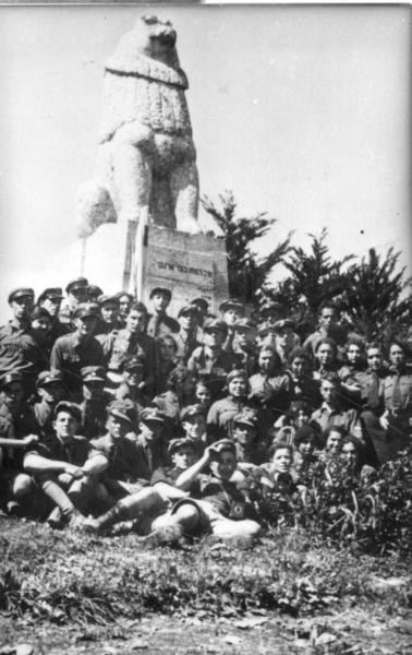 חניכי בית"ר הרצליה על קברו של יוסף טרומפלדור בתל חי.